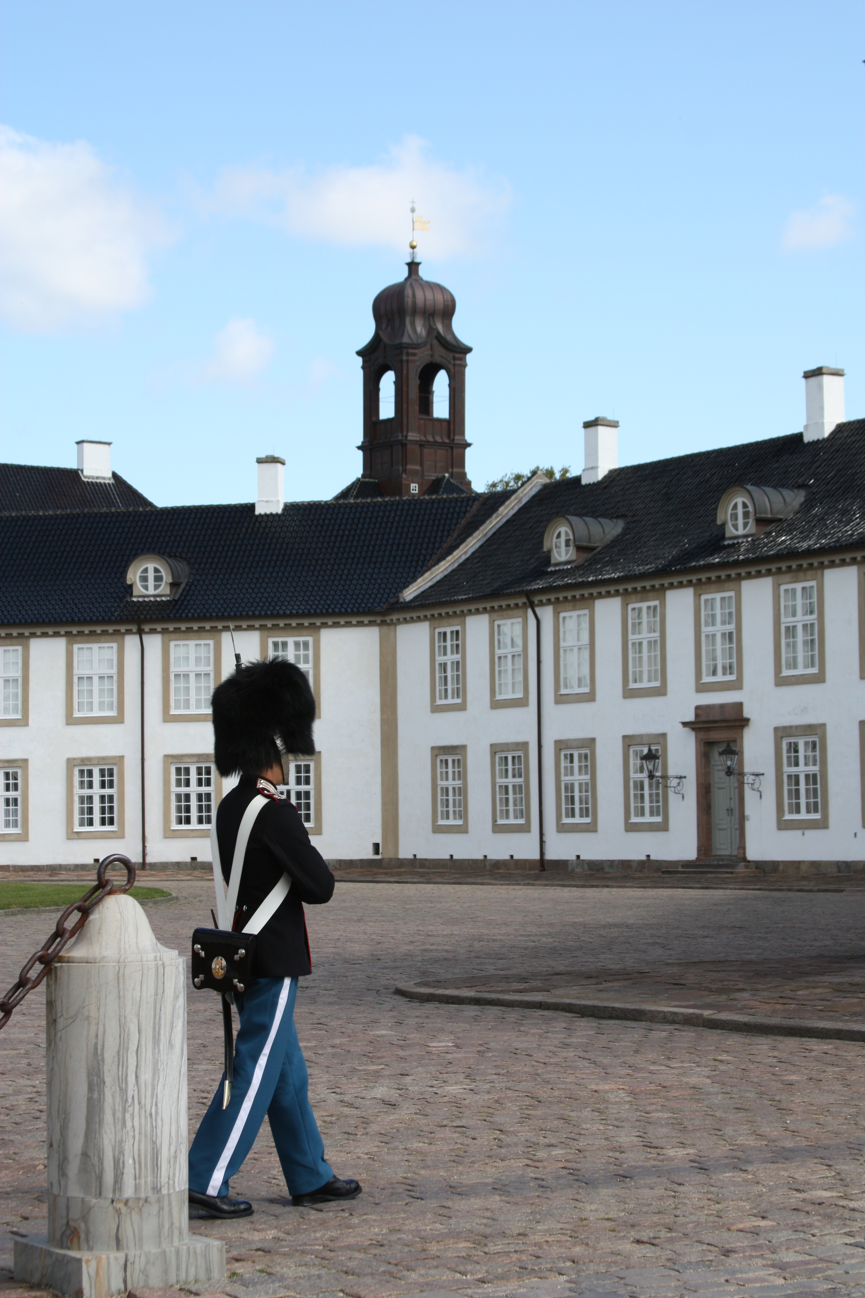 Fredensborg Slot, near Copenhagen, August 2009